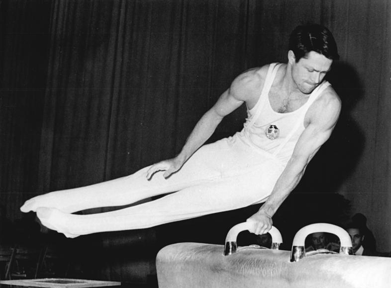 Matthias Brehme Zentralbild Liebers 13-12-69 Gera: DDR-Turnmeisterschaften der Männer in der Geraer "Erwin-Panndorf"-Sporthalle - Matthias Brehme (SC DHfK Leipzig) bei der Pflicht am Seitpferd.